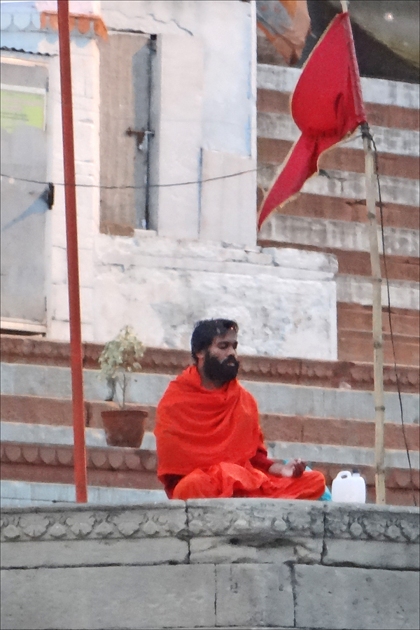 Dévot en méditation sur un ghat Varanasi, autrefois appelée Bénarès, est située au bord du Gange, à la confluence des fleuves Varunā et Assī. C'est l'une des plus importantes villes sacrées de l'Hindouisme. Son nom traditionnel est Kâshî, la cité lumineuse de Shiva. Varanasi est la Ville-lumière et la Ville-du-Savoir, consacrée à Shiva. Le Linga-d'Eau y est vénéré. La ville est célèbre pour ses ghāts, qui sont des berges recouvertes de marches de pierres permettant aux dévots hindous de descendre au fleuve pour y pratiquer ablutions et pūjās. Sur certains ghāts, les crémations sont rituellement pratiquées. Article de Wikipedia sur Varanasi Mythes et Dieux de l'Inde, Daniélou, Flammarion, 1992